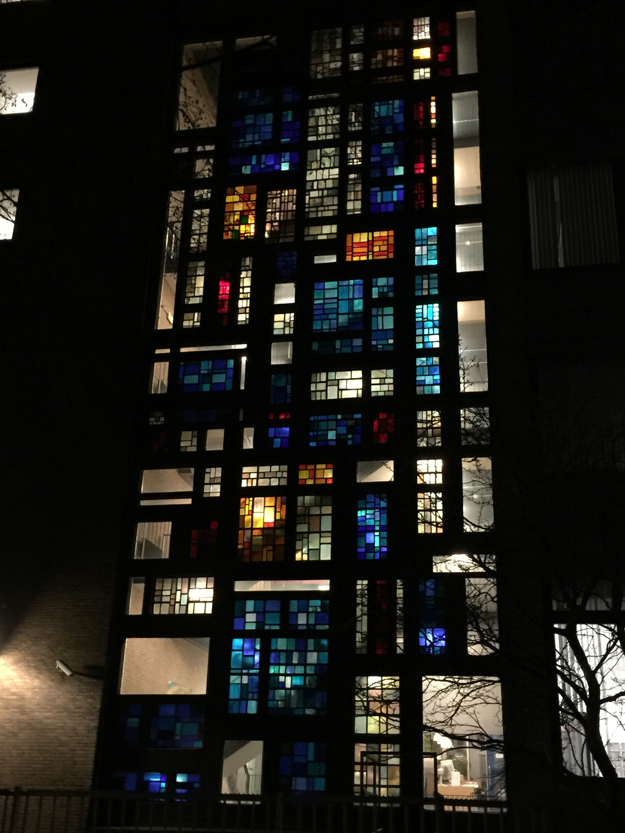 Belastingkantoor Leiden, Stationsweg. Glassculptuur Jan Meine Jansen., 's nachts